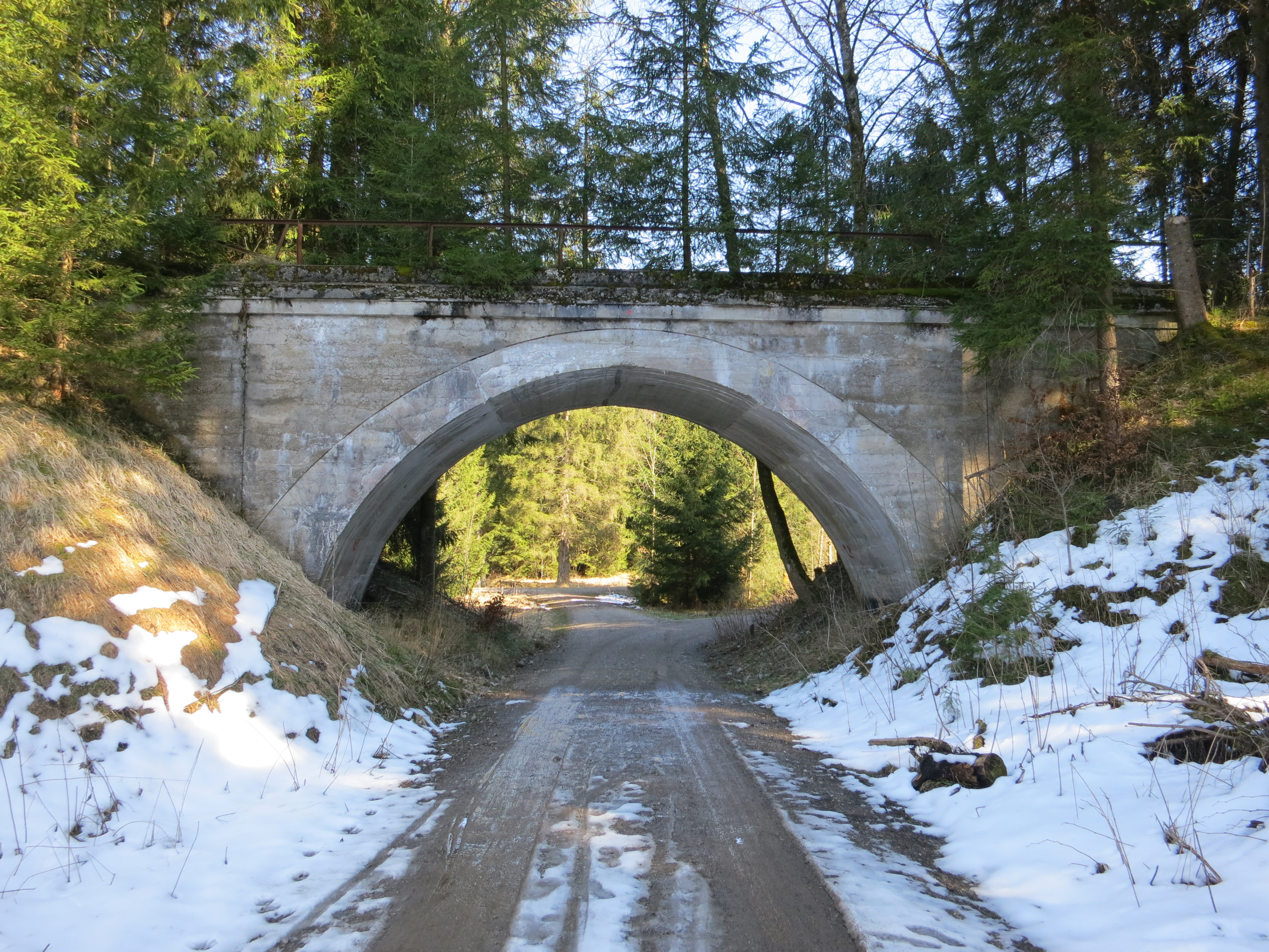 Eisenbahnbrücke der stillgelegten Bahnstrecke Kaufbeuren–Schongau im Sachsenrieder Forst (Kilometer 18,5)